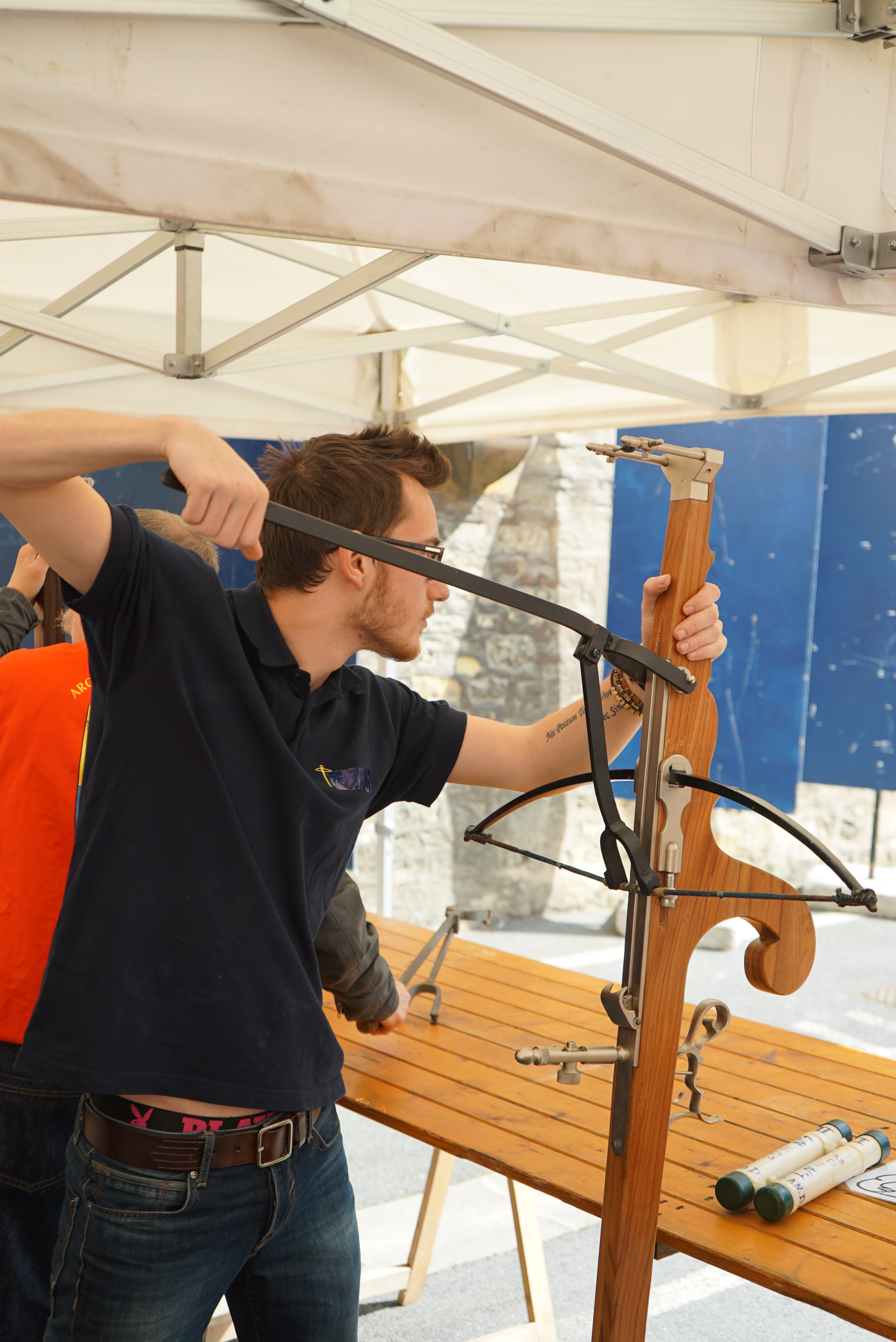 lors de la Fêtes des confréries de Charleville, 2017.